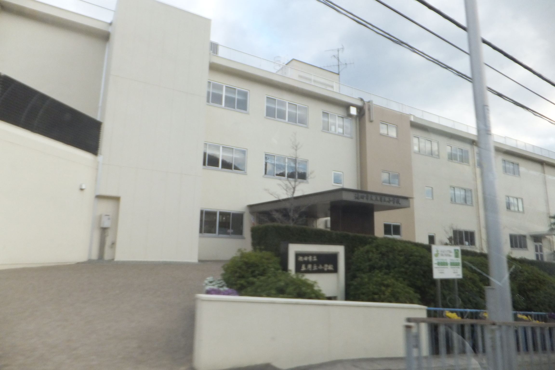 池田市立五月台小学校